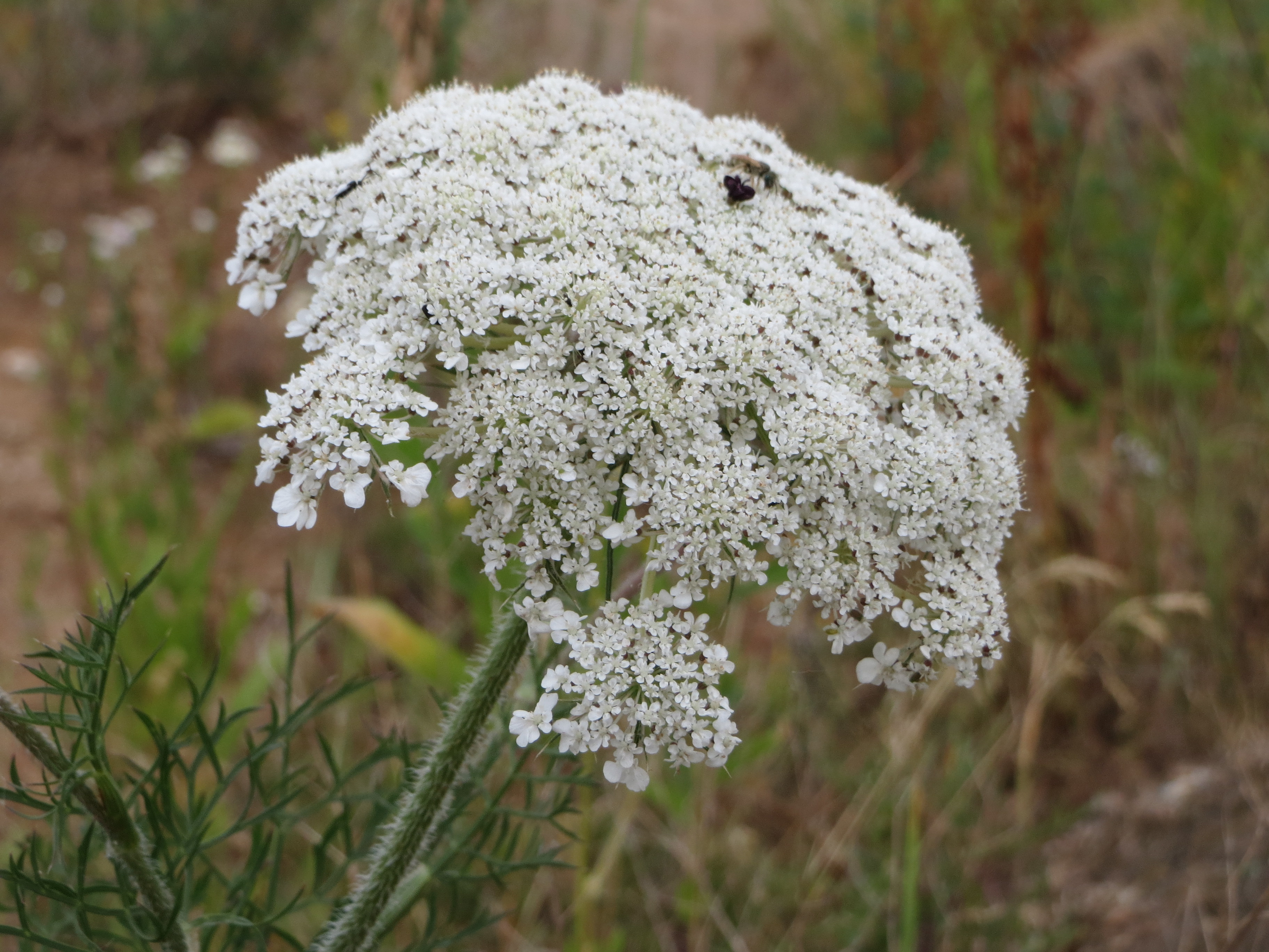 Wilde Möhre (Daucus carota) in Hockenheim-Talhaus